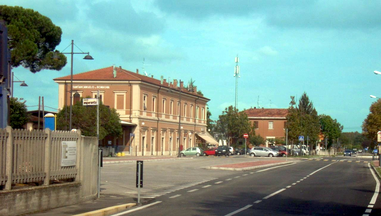 Esperanto-Placo (Piazzale Esperanto) antaŭ la stacidomo de Santarcangelo di Romagna.